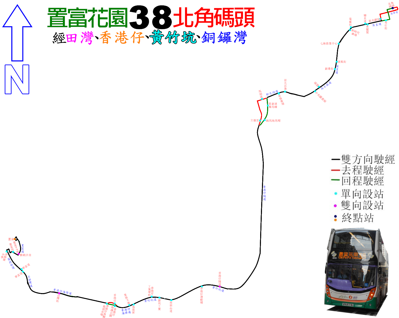 中文（香港）: 新巴38線的走線圖